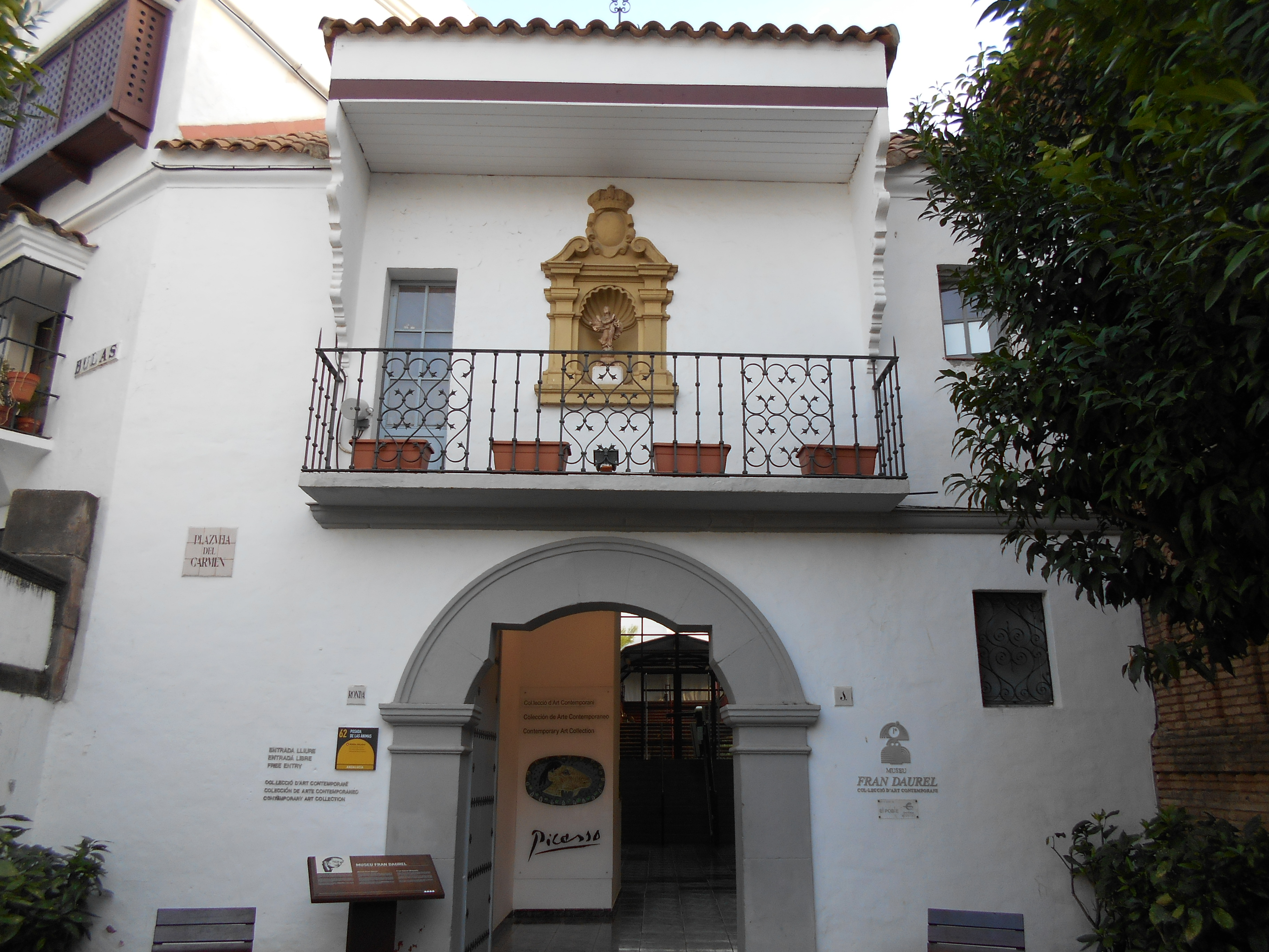 Museo Fran Daurel, Pueblo Español.